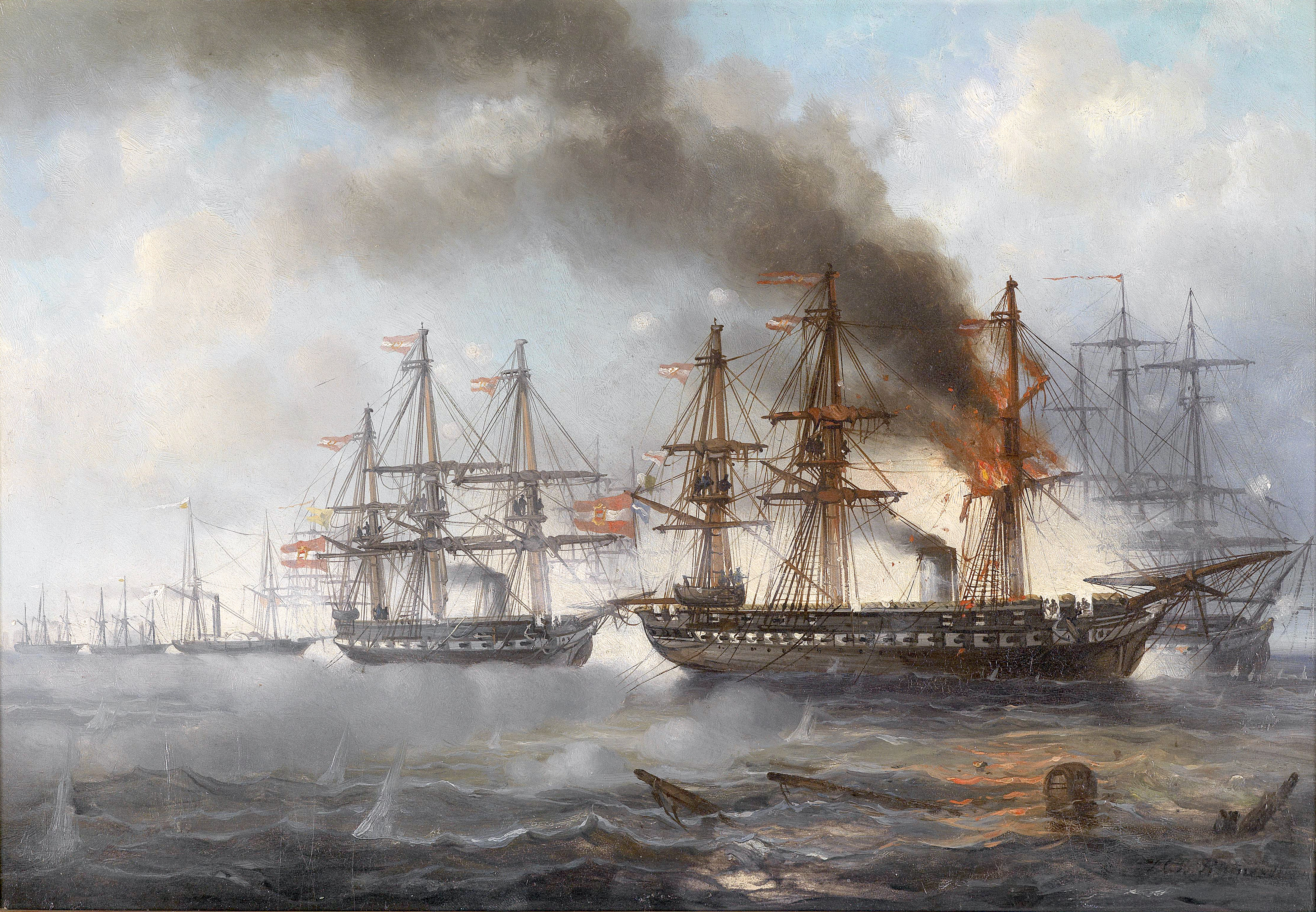 Das Seegefecht bei Helgoland 1864 (die brennende österreichische Fregatte Schwarzenberg, dahinter die Fregatte Radetzky), Öl auf Karton, signiert "Püttner", 38,5 x 26,5 cm